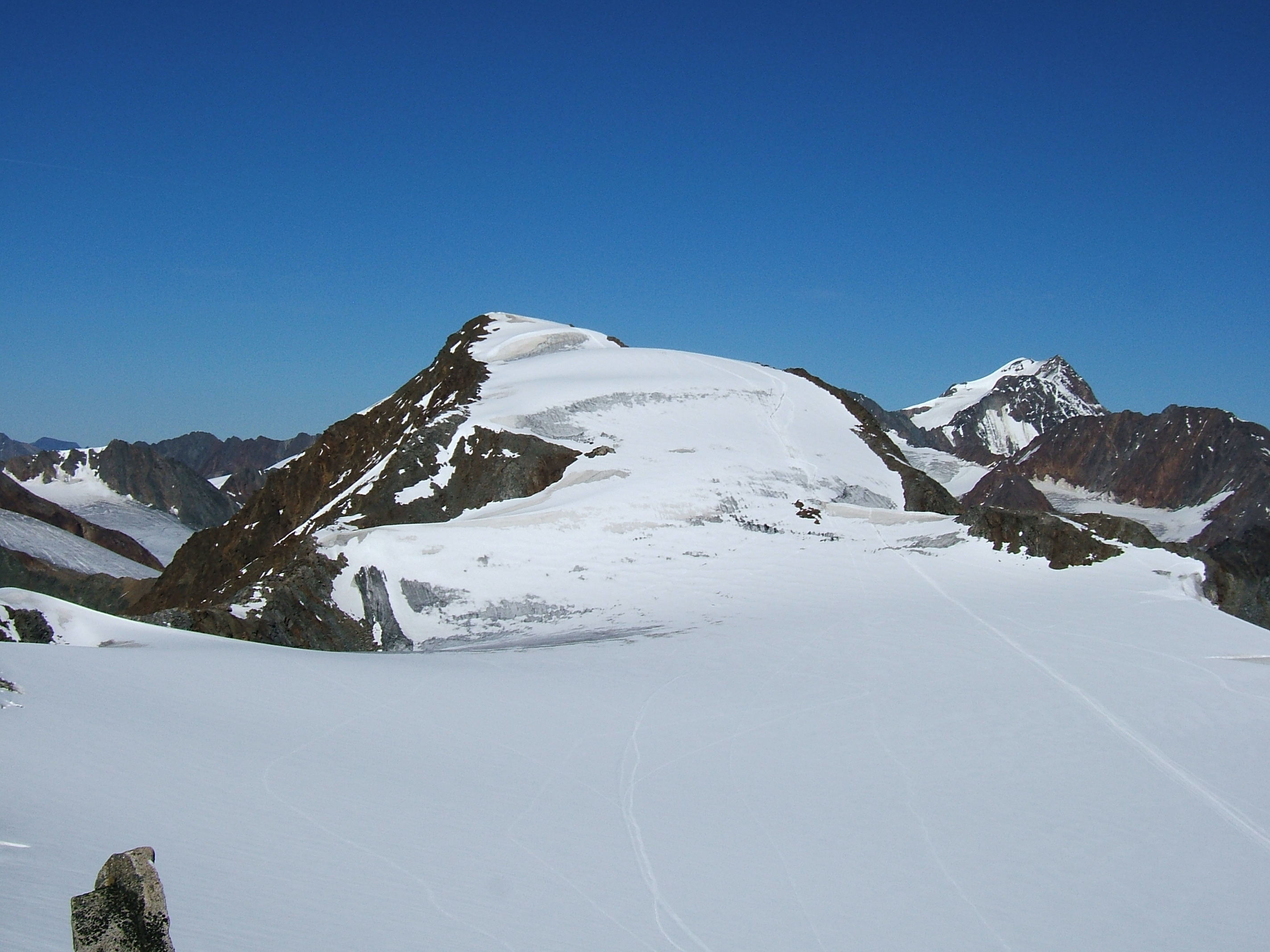 Fluchtkogel von Südwesten, von der Dahmann Spitze